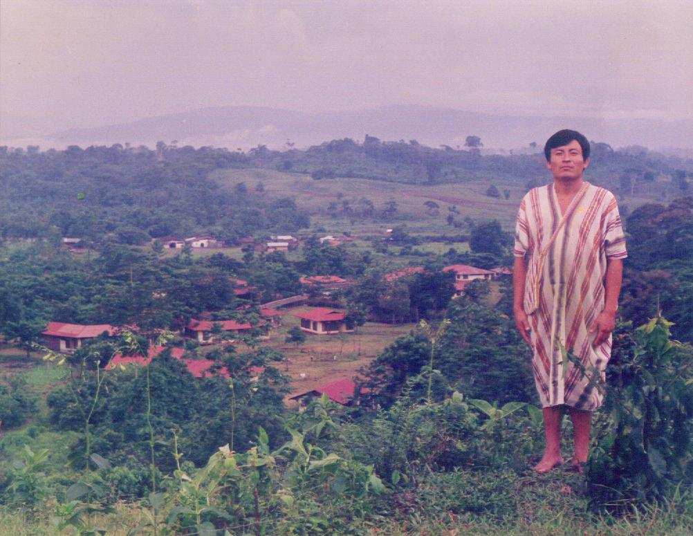 El valle del Palcazú y el campamento del Proyecto de Desarrollo Rural que albergó la transculturización de la etnia Yanesha, desde tiempos del 2do gobierno de Belaúnde Terry en la selva central del Perú.